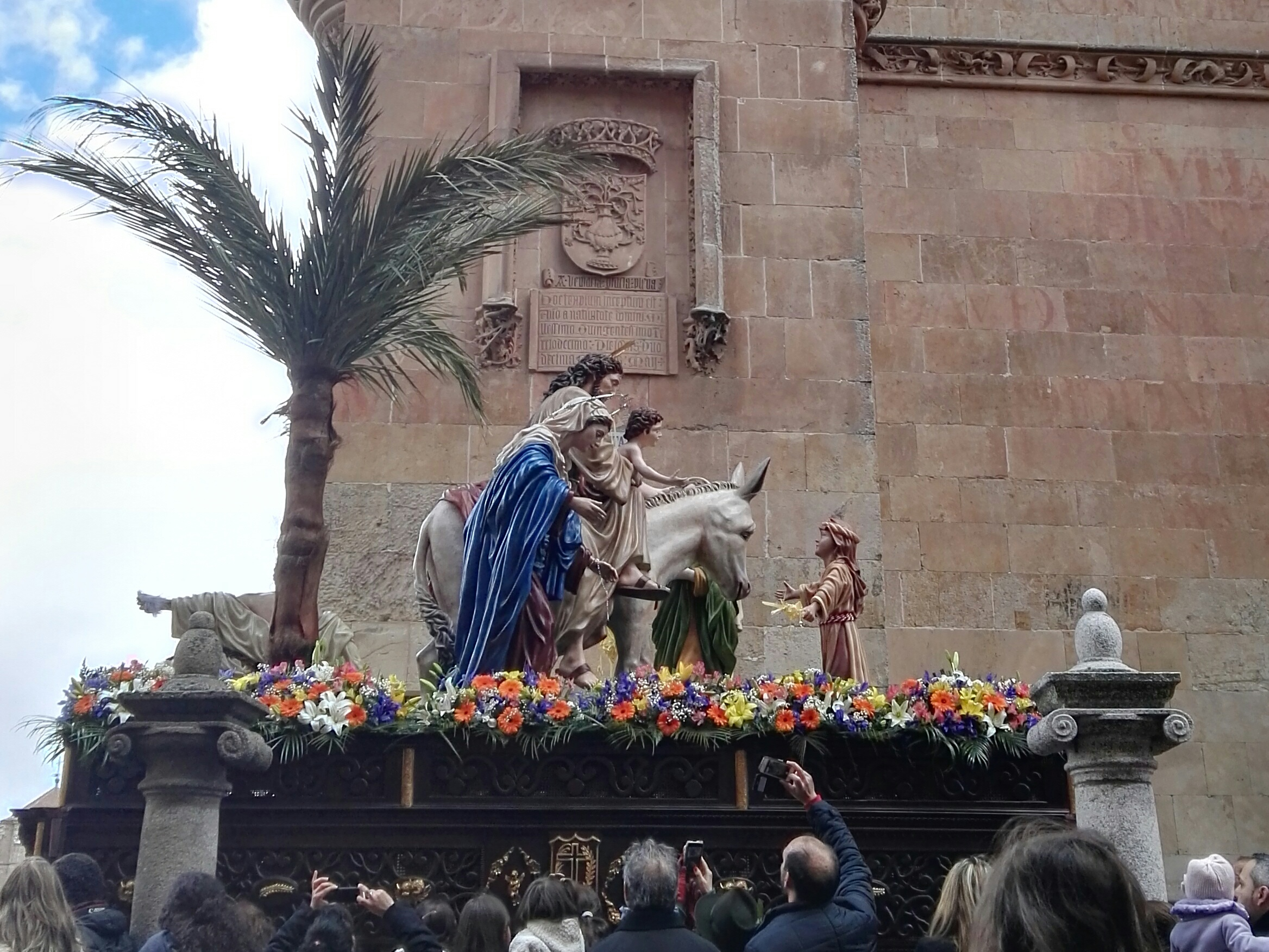 Paso de Jesús Amigo de los Niños en el atrio de la Catedral Nueva.